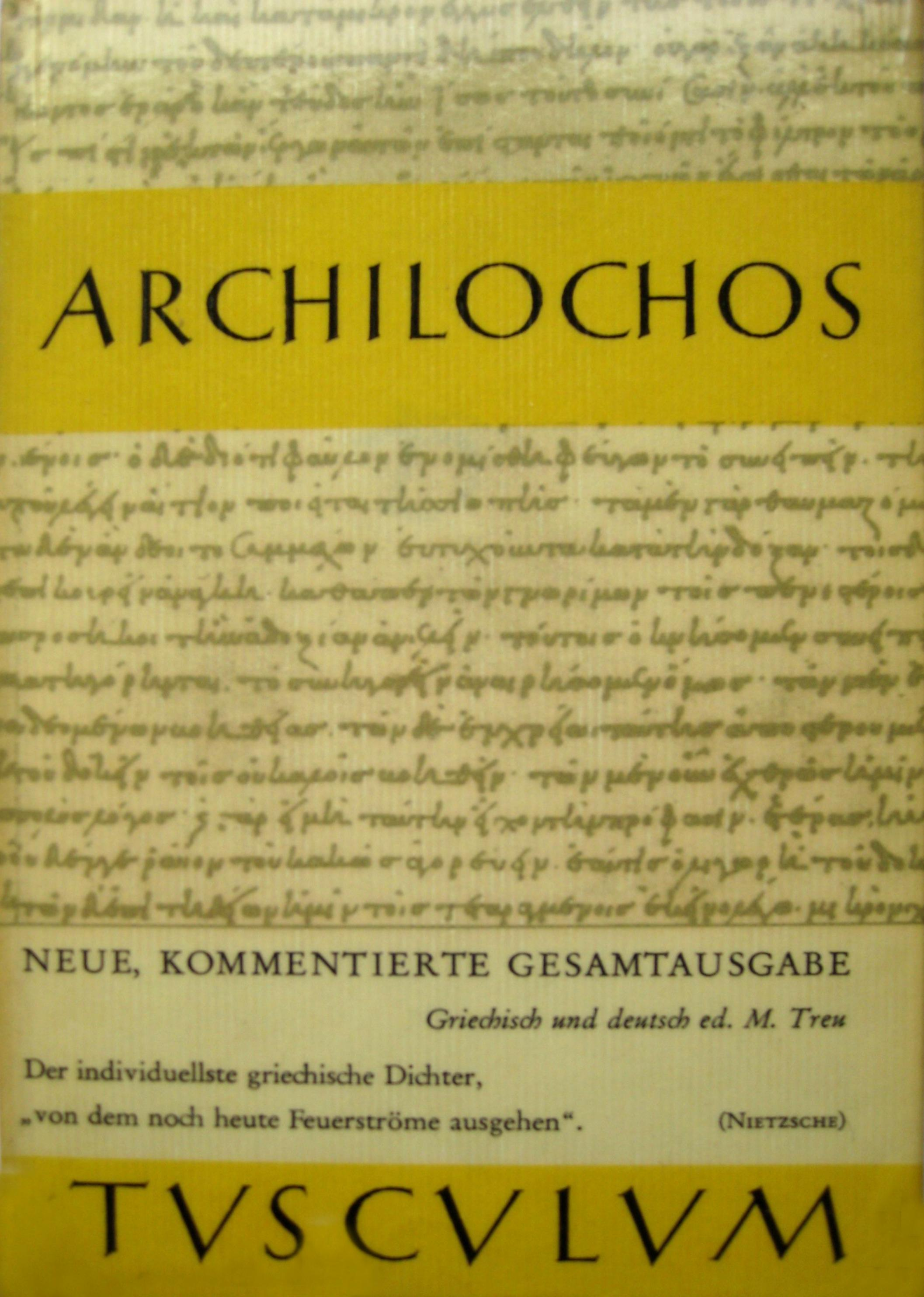 Dust jacket Sammlung Tusculum